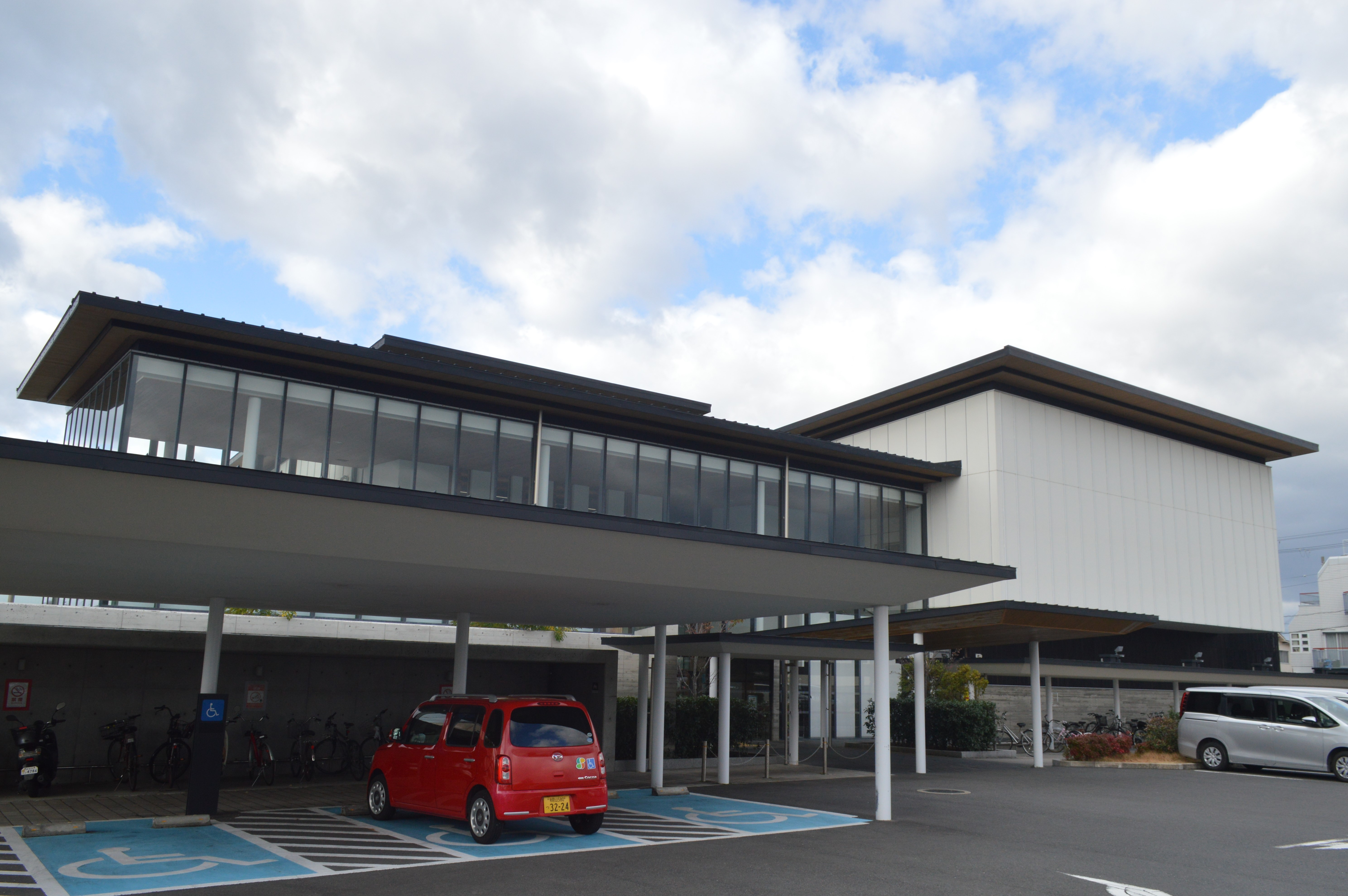 和歌山県田辺市にある「田辺市文化交流センターたなべる」。田辺市立図書館と田辺市立歴史民俗資料館を併設。